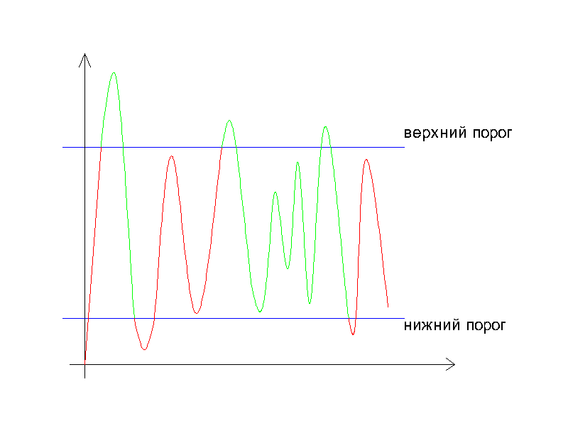 гистерезис